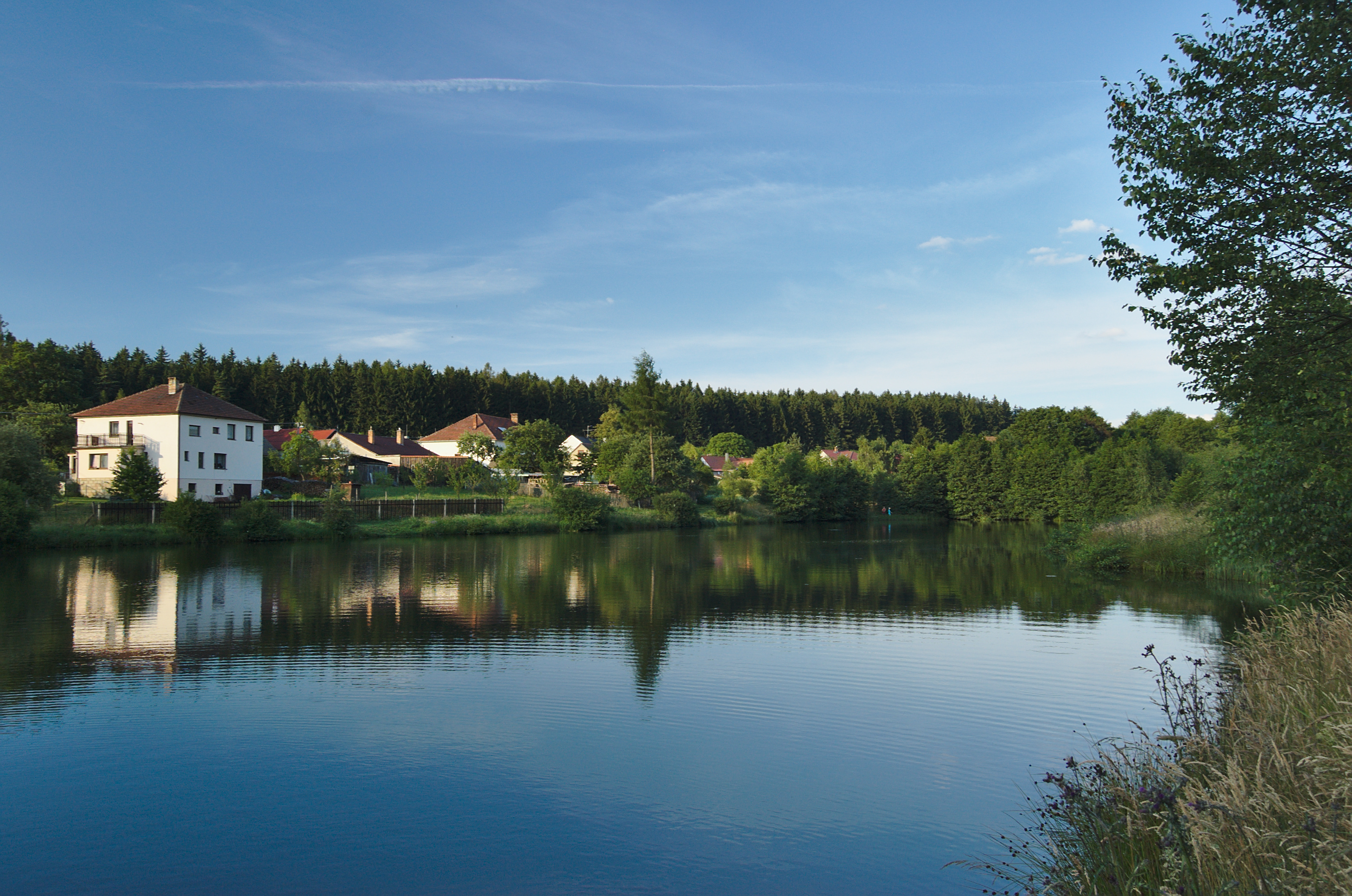 Pohora - pohled na vesnici od rybníku, Horní Štěpánov, okres Prostějov